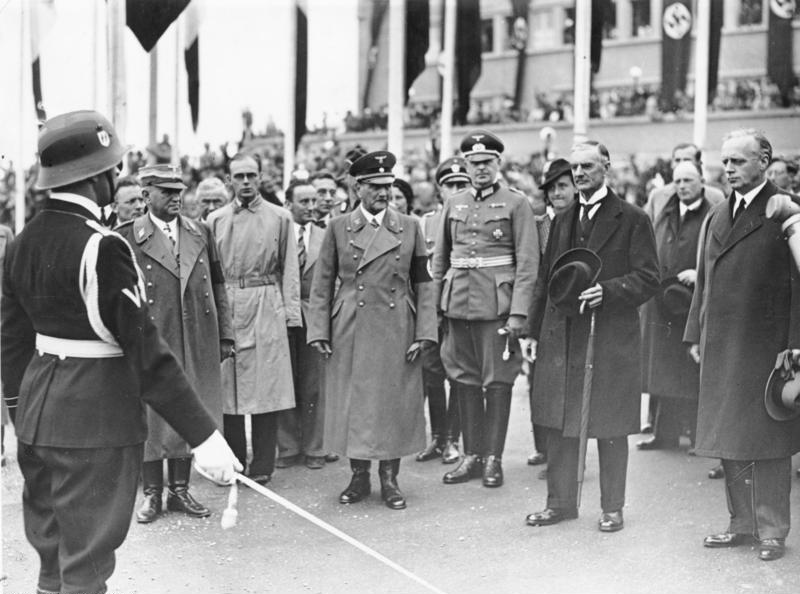 Scherl: Die Abreise der ausländischen Staatsmänner von München Der Chef der Ehrenkompanie der SS Standarte "Deutschland" meldet Ministerpräsident Chamberlain seine Formation.Rechts Reichsaussenminister v. Ribbentrop, Mitte Reichsstatthalter Ritter von Epp,Links der bayerische Ministerpräsident Siebert. 30.9.38, 12911-38